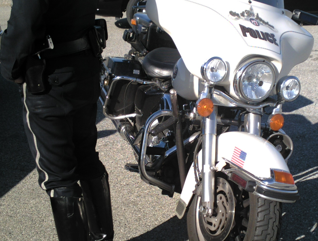 LAPD白バイ（ハーレー）にサイドハンドルを装着した状況。旧KawasakiやBMWは後部バンパー付近への装着になり、いずれの位置に装着する場合もブラケットには切り欠きが付いて走行中にハンドル部分が回転しないようにしてある。